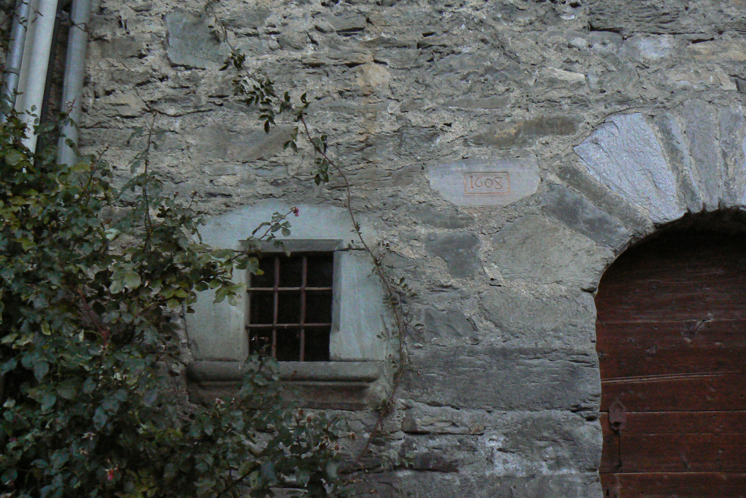 Maison d'Aragon o Casaforte Aragon, in località Echarlod, La Salle, Valle d'Aosta, Italia.